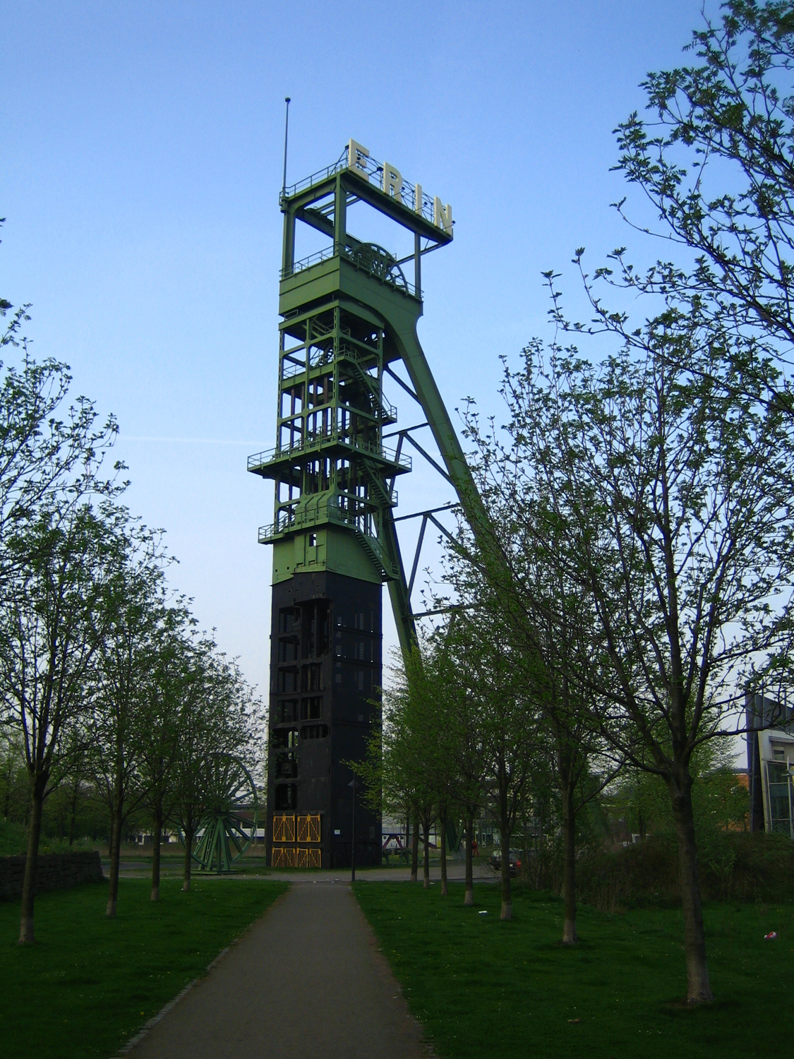 Erintum Förderschacht der Zeche Erin in Castrop-Rauxel